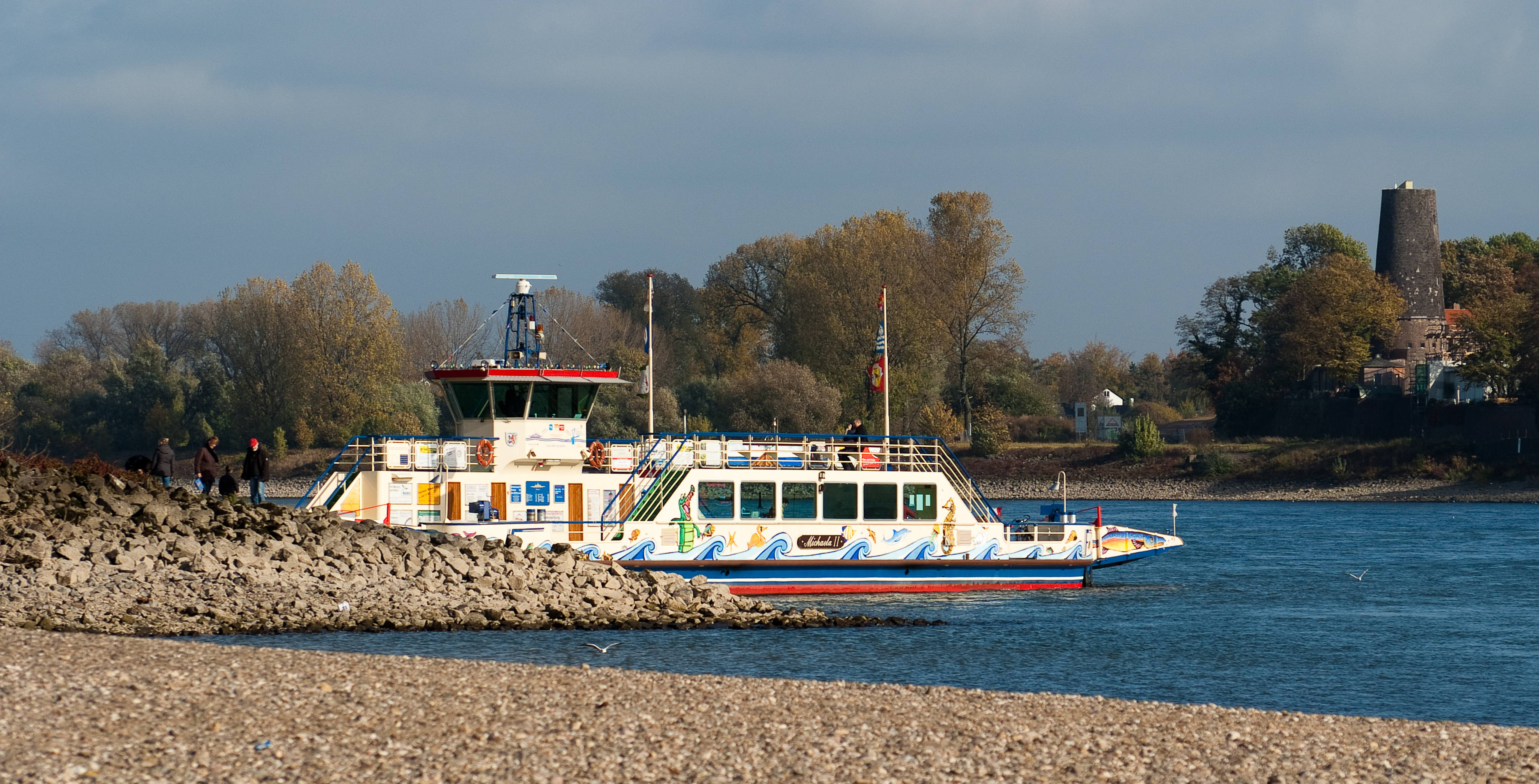 Fährschiff Michaela II, Fährverbindung zwischen Meerbusch-Langst-Kierst und Düsseldorf-Kaiserswerth, auf der Meerbuscher Rheinseite